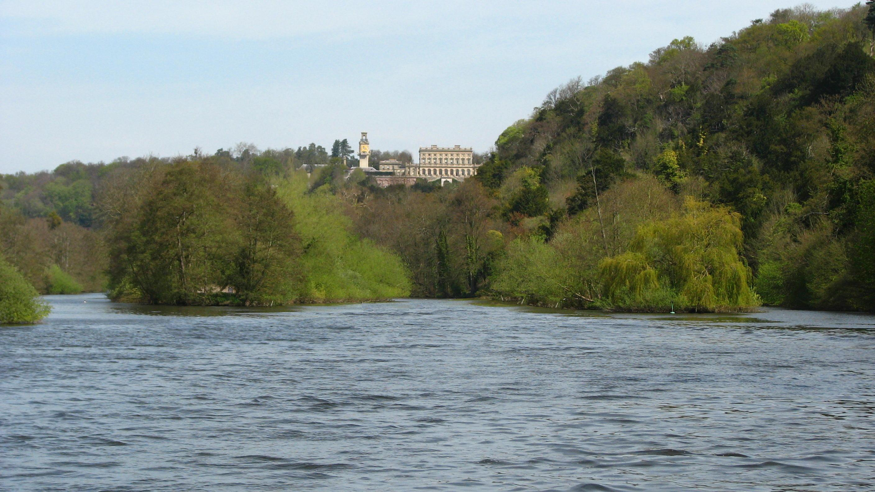 Ritocco della foto originale di Nancy file:Bavin's Gulls on the River Thames at Cliveden Deep